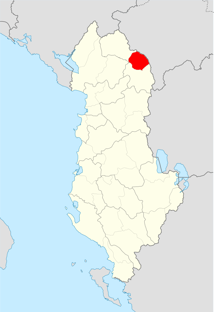 Harta e Shqipërisë